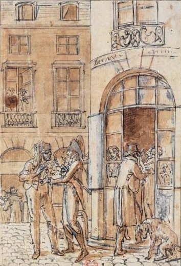 Change des assignats, passage du Perron, au Palais-Royal, scènes de moeurs, 1789-1799. Dessin à la plume et lavis à l'encre brune, rehauts de blanc 17,1 x 12,7 cm, par Claude-Louis Desrais (1746-1816), en provenance de la collection Hippolyte Destailleur.